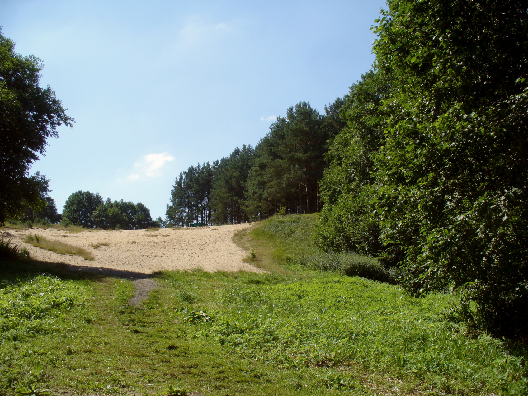 Адзін з адхонаў катлавіны воз. Лугавое. г. Гарадок Віцебскай вобл.